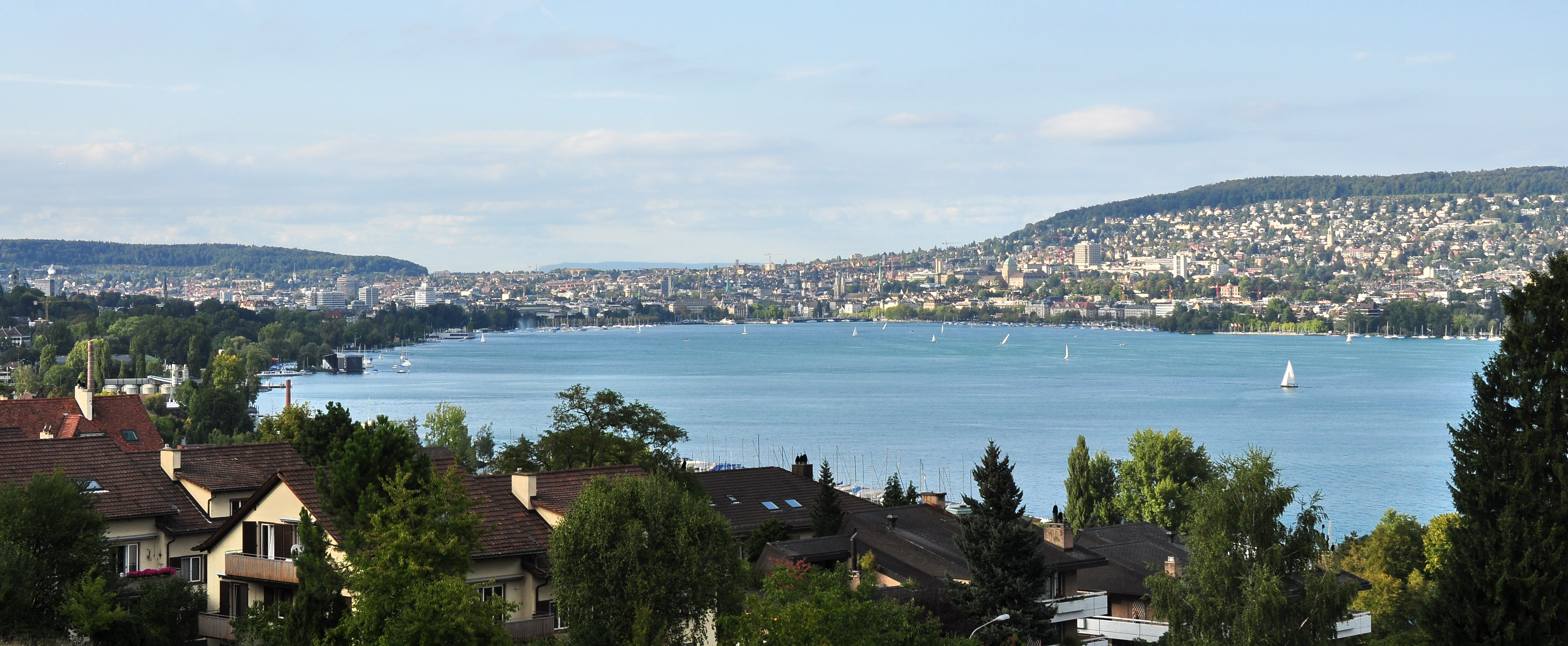 Unteres Zürichseebecken in Zürich (Switzerland)